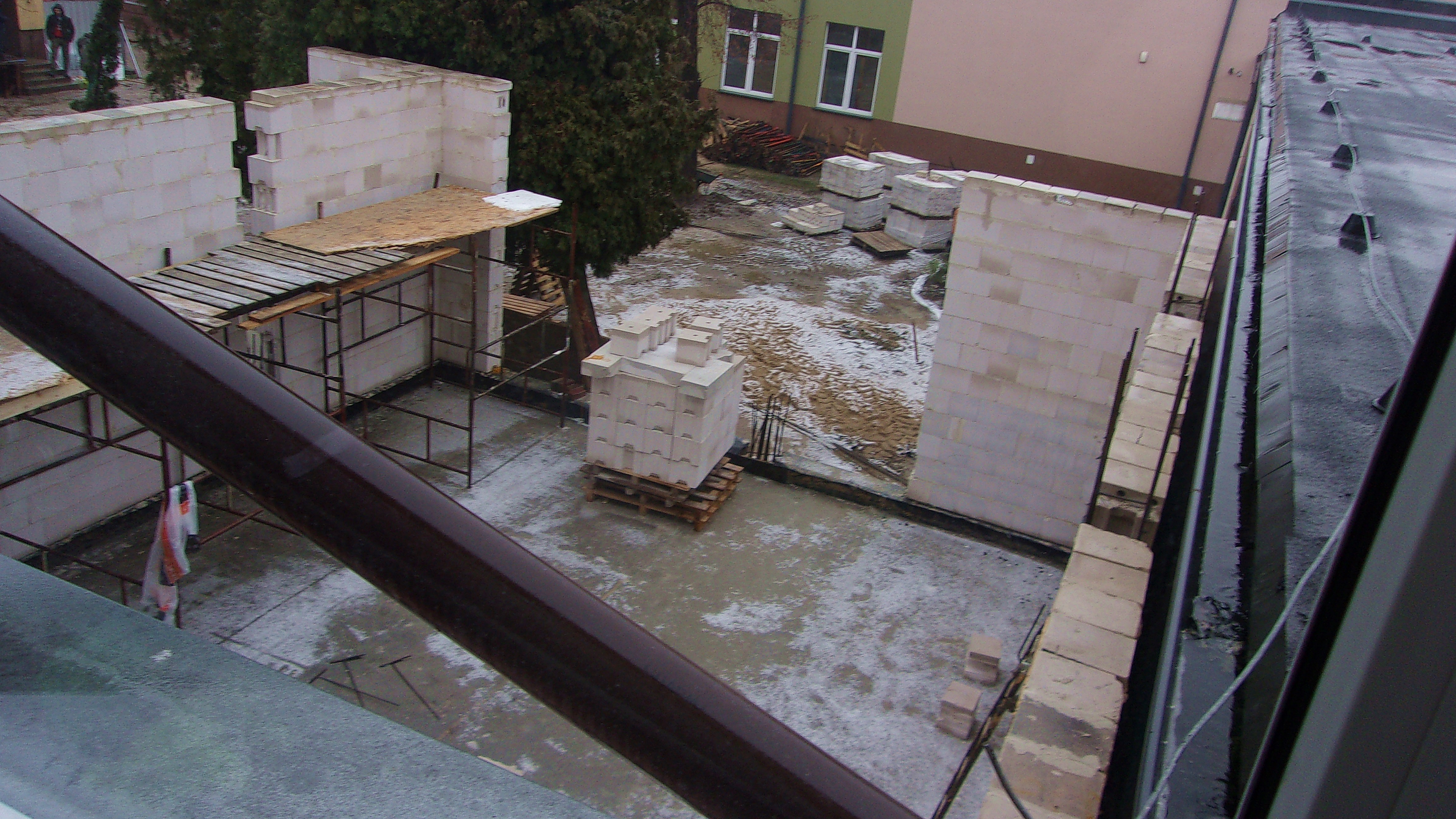 Budowa nowego sekretariatu, pokoju nauczycielskiego i pokoju dyrektora. Stan prac na 7.12.2018 r.